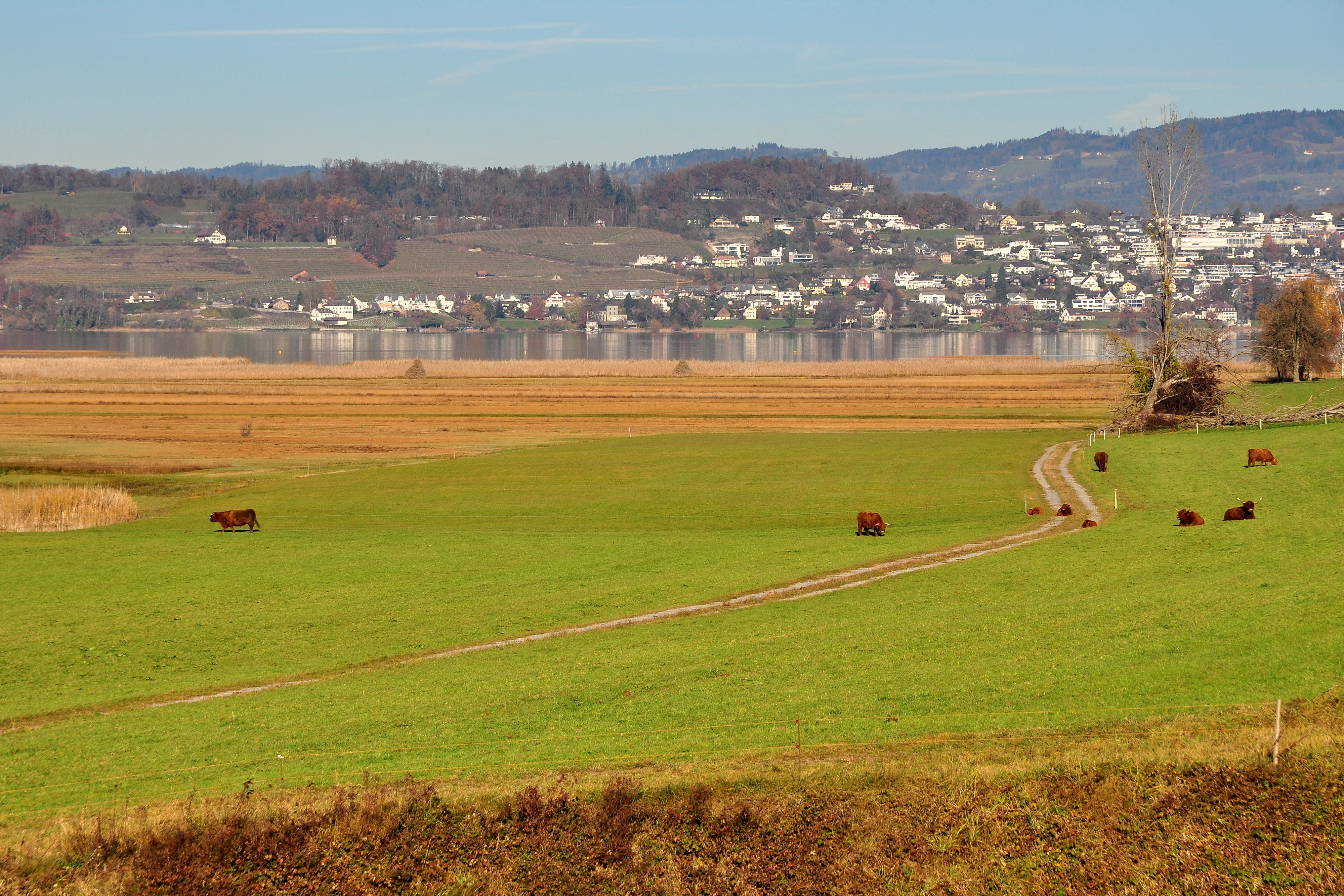 Kyloe, Frauenwinkel protected area on Zürichsee (Switzerland)